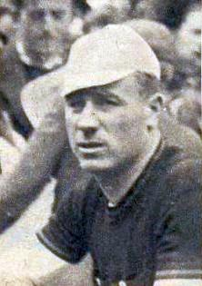 François Neuville (1939).